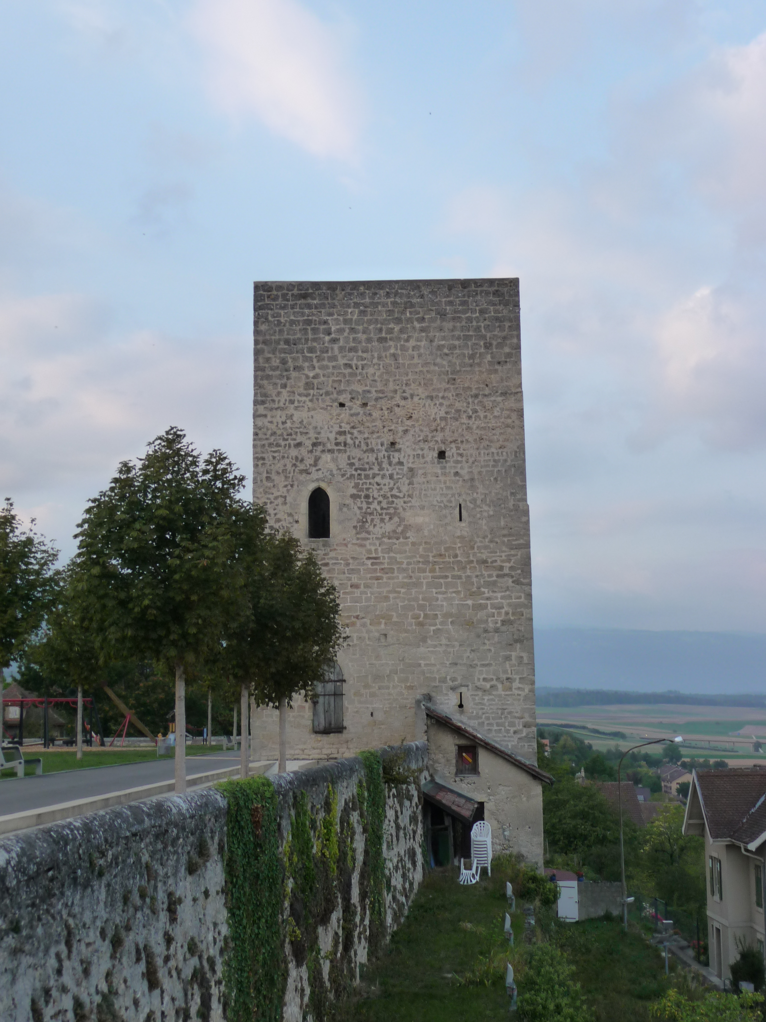 Orbe.